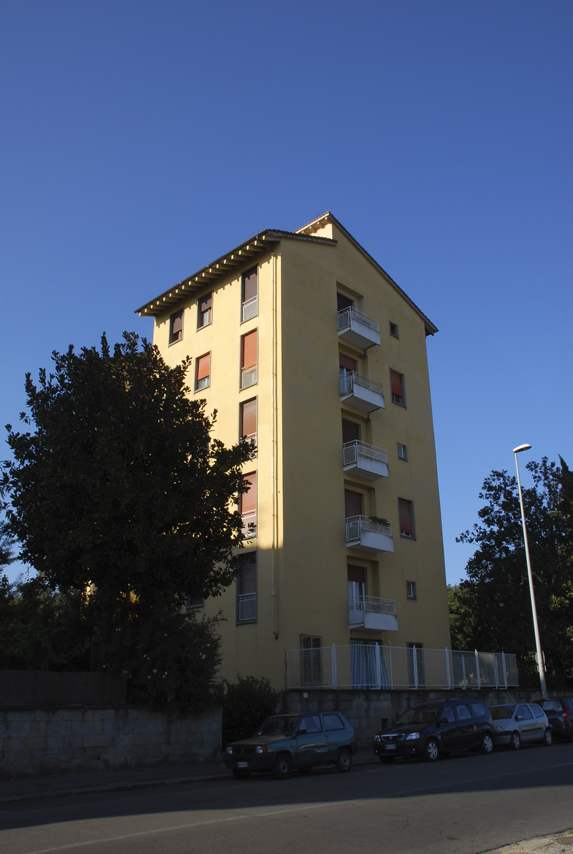 Isolotto (quarter), Florence, Italy. Piazza dell'Isolotto: Tower.